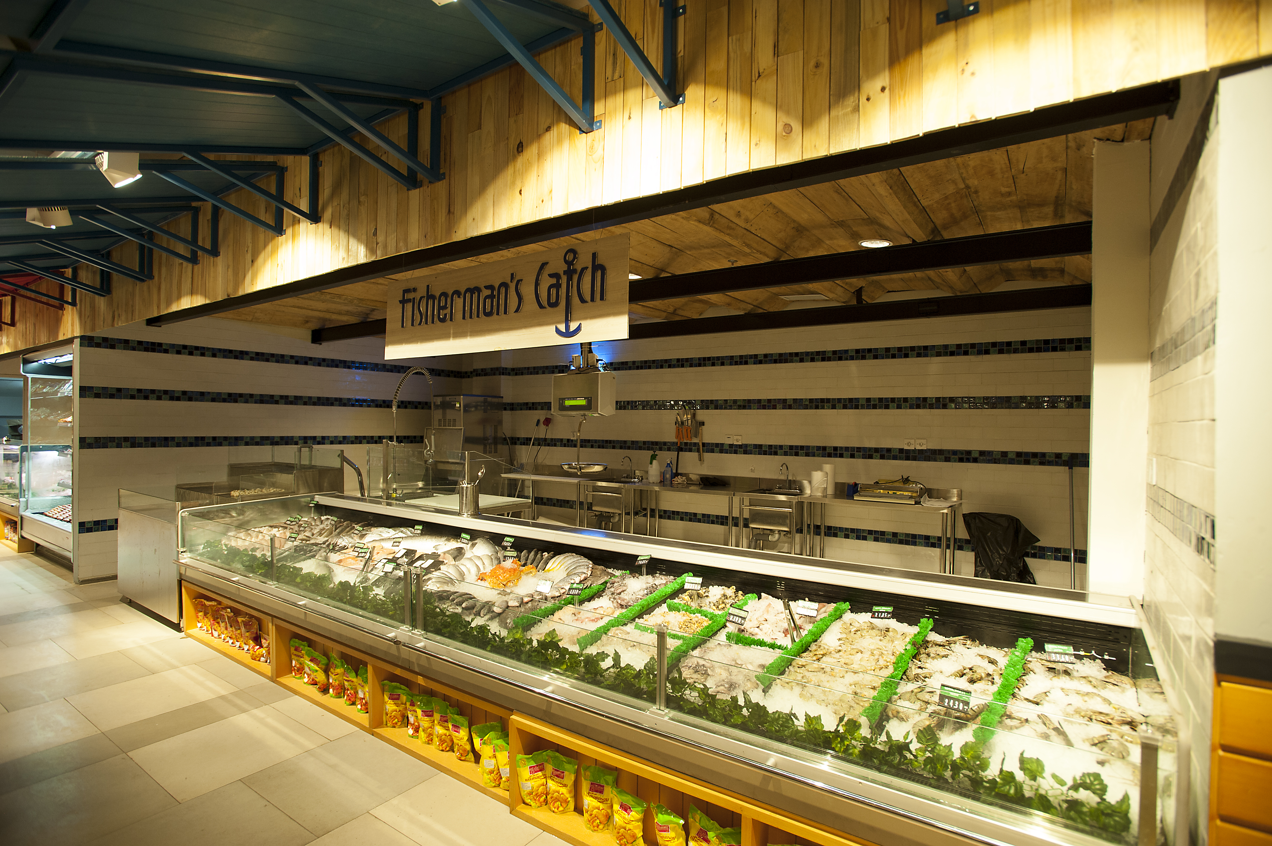 Fisherman’s Catch yang menawarkan berbagai ikan dan seafood